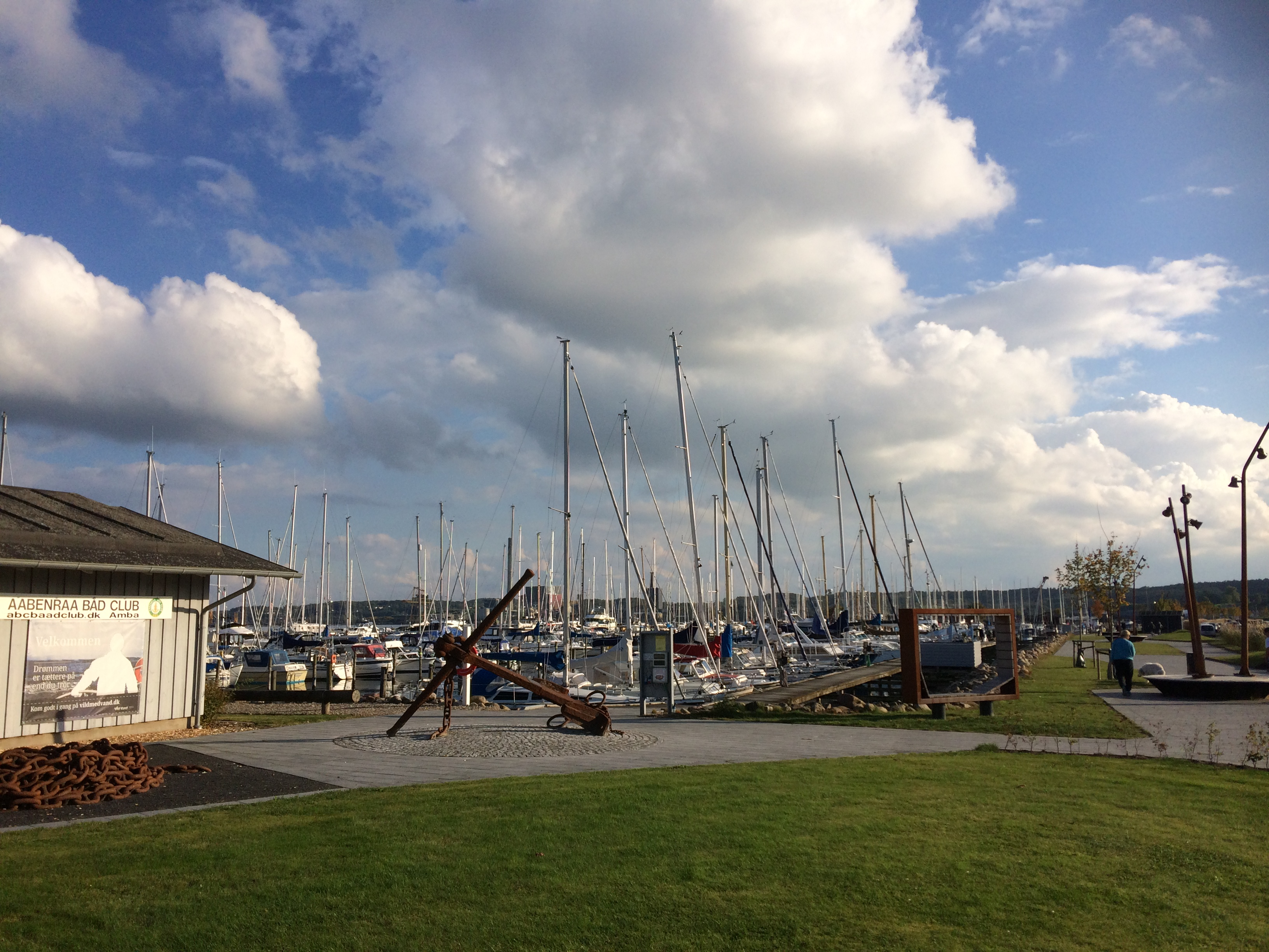 Meget aktiv og social bådclub for sejl- og motorbåde. Her arrangeres kapsejladser og tursejladser for alle.